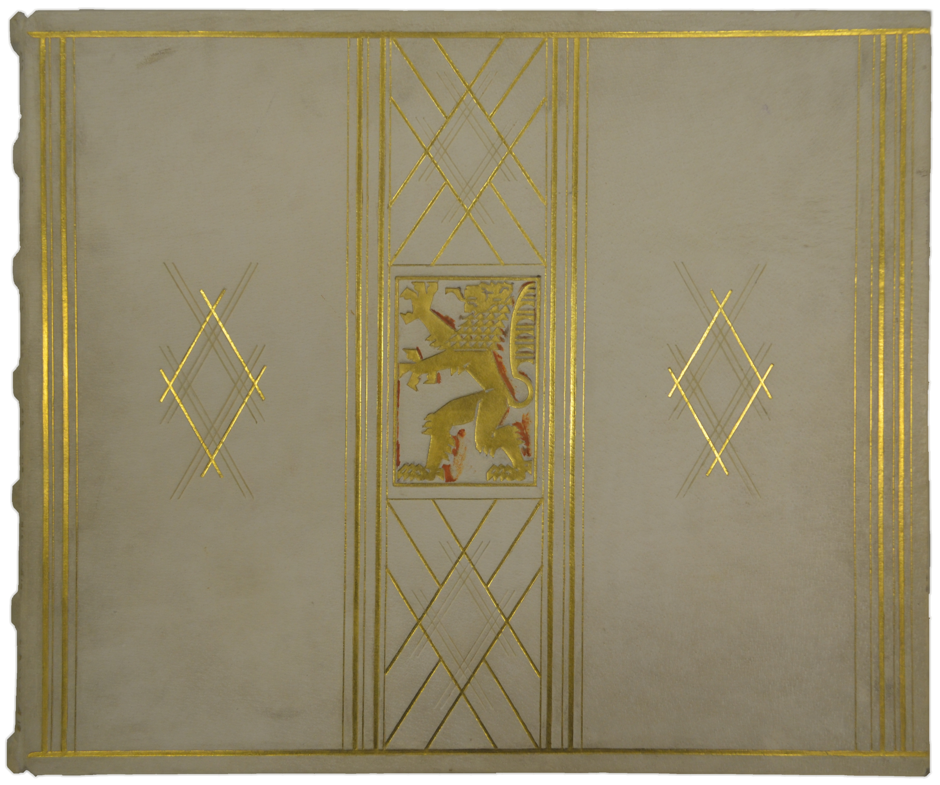 Braunschweig: Einbanddeckel 1. Goldenes Buch der Stadt Braunschweig, geführt von 1926 bis 1942